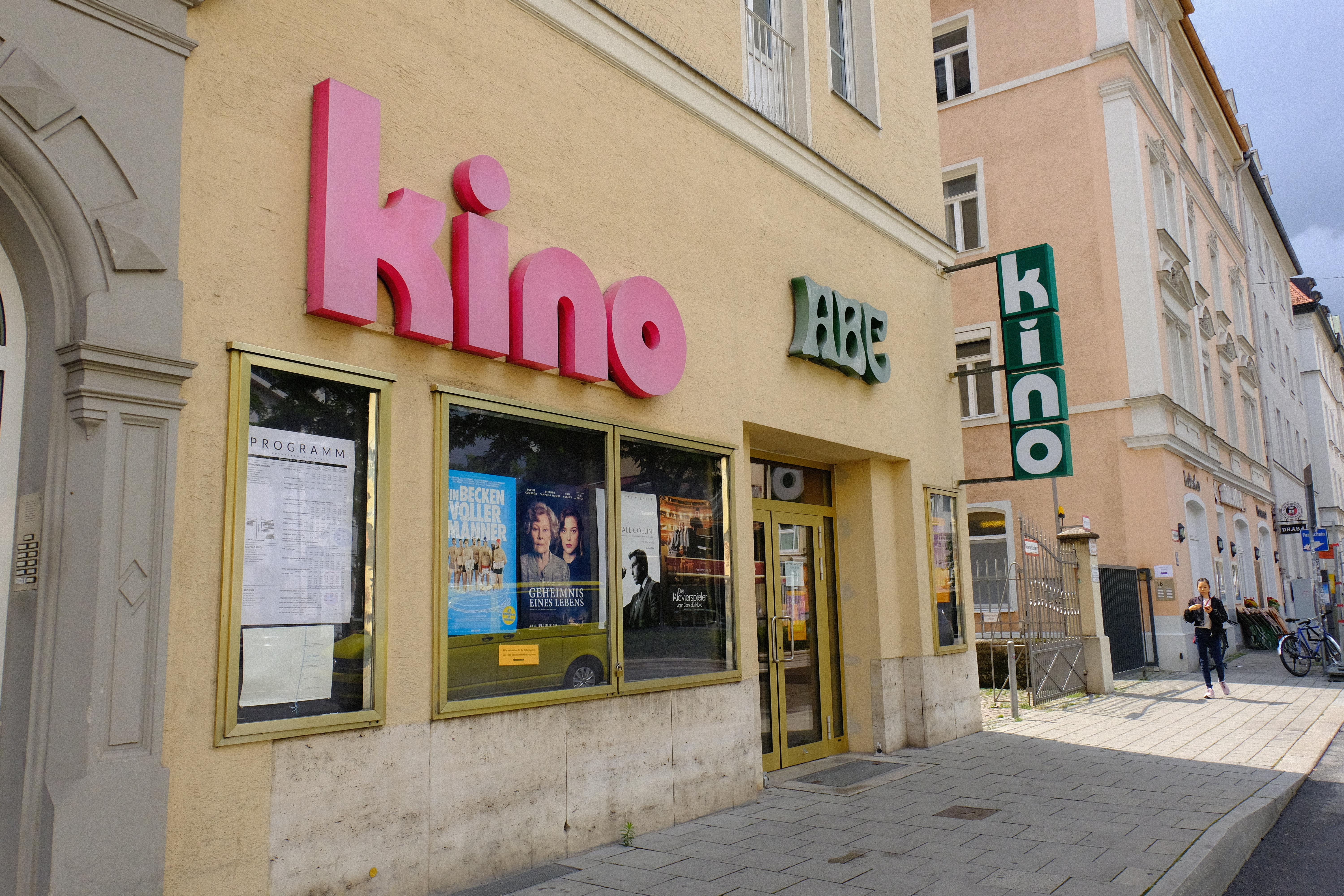 Das ABC-Kino in der Münchner Herzogstraße (Außenansicht)